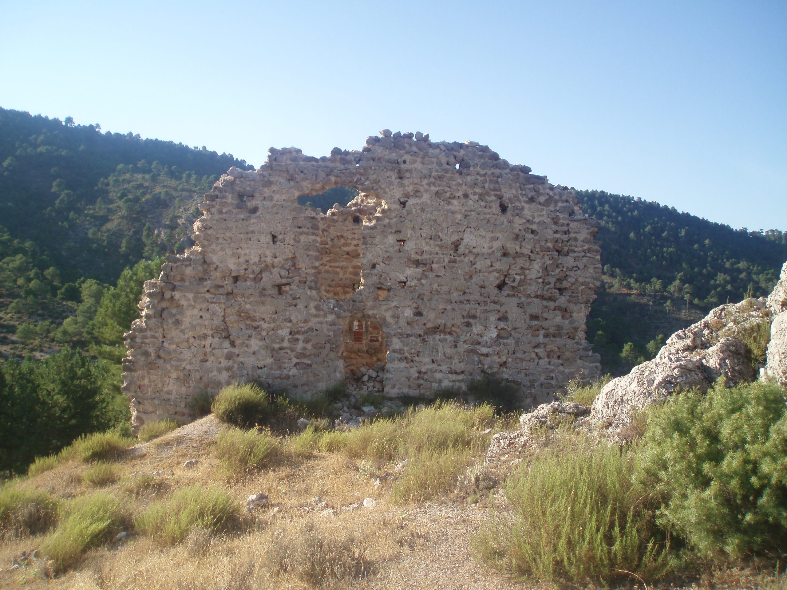 Fotografía del Castillo de San Vicente, también llamado de El Santo o de La Vegallera (por ser las localidades más cercanas al mismo) dentro del municipio de Molinicos (Albacete)